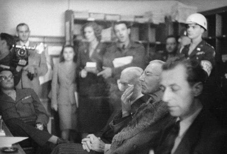 Nürnberger Prozess, Papen, Schacht, Fritzsche ADN-ZB Nürnberger Kriegsverbrecherprozeß Strafprozeß vor dem Internationalen Militärgerichtshof in Nürnberg vom 20.11.1945 bis 1.10.1946 gegen führende Personen (Hauptkriegsverbrecher) des faschistischen Deutschlands wegen Kriegsverbrechen, Verbrechen gegen den Frieden und gegen die Menschlichkeit; abgeschlossen durch Urteil vom 30.9./1.10.1946. Urteilsvollstreckung am 16.10.1946. UBz.: Die Angeklagten (von rechts) Hans Fritzsche, Hjalmar Schacht und Franz von Papen kurz nach ihrem Freispruch vor Pressevertretern. Abgebildete Personen: Papen, Franz von: Reichskanzler, Vizekanzler, Botschafter, Deutschland Schacht, Hjalmar Dr.: Reichswirtschaftsminister, Reichsbankpräsident, Nürnberger Prozeß, Deutschland (GND 118606026)